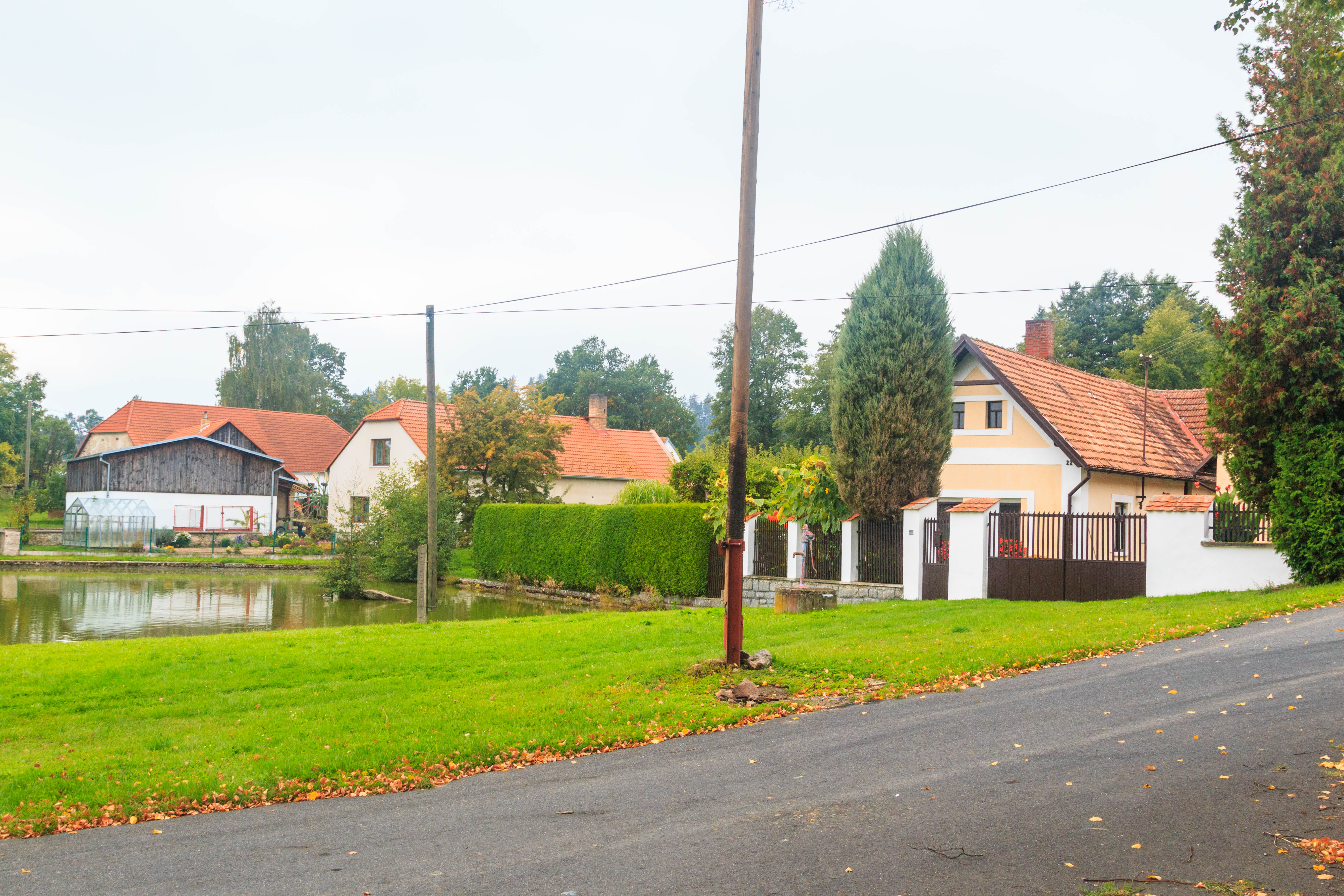 Láz u Radomyšle - náves